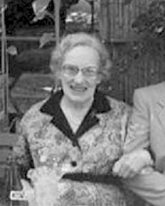 Dieter Baumann, Marie-Loise von Franz y José Zavala